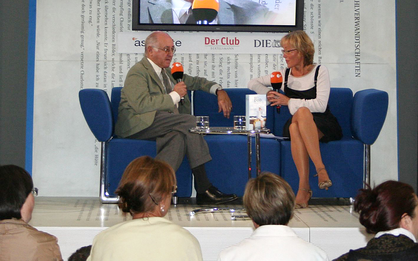 Luzia Braun im Gespräch mit Alfred Biolek auf dem "Blauen Sofa" bei der Frankfurter Buchmesse, anlässlich der Veröffentlichung seiner Autobiographie "Bio. Mein Leben"